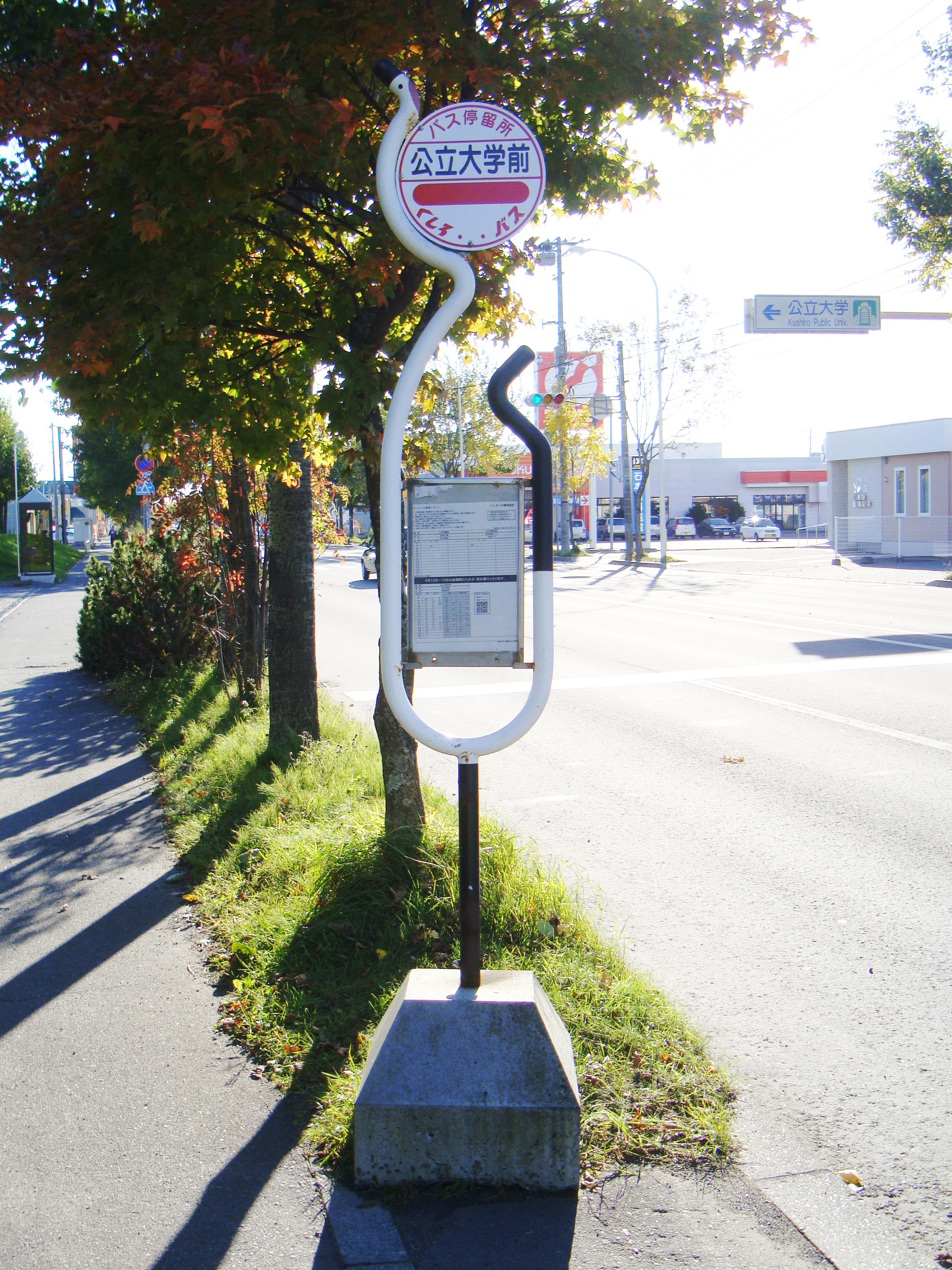 "Kōtitsu Daigaku mae" Bus stop